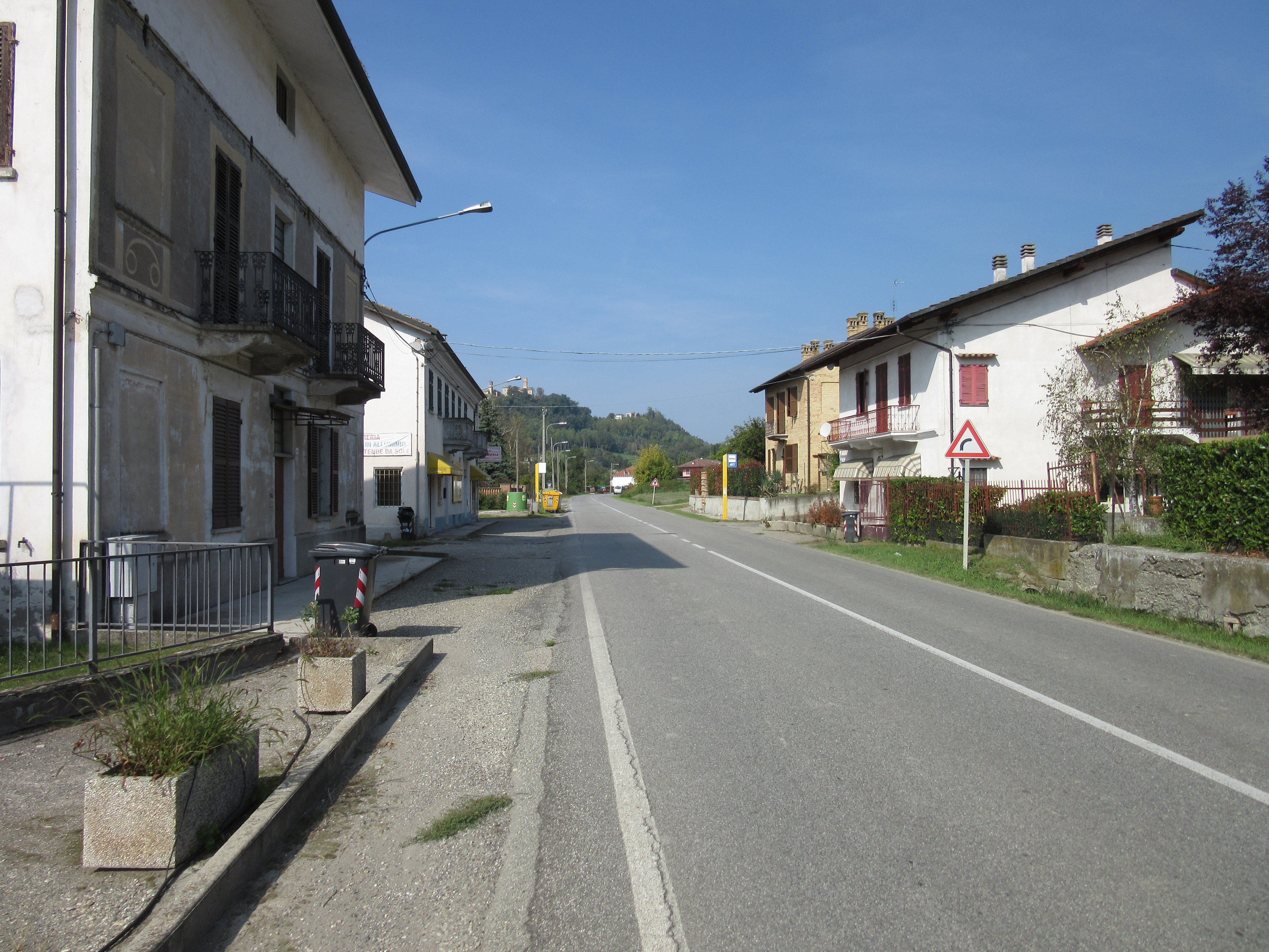 San Candido di Murisengo (AL), località Fornace. Sul colle in fondo, Murisengo